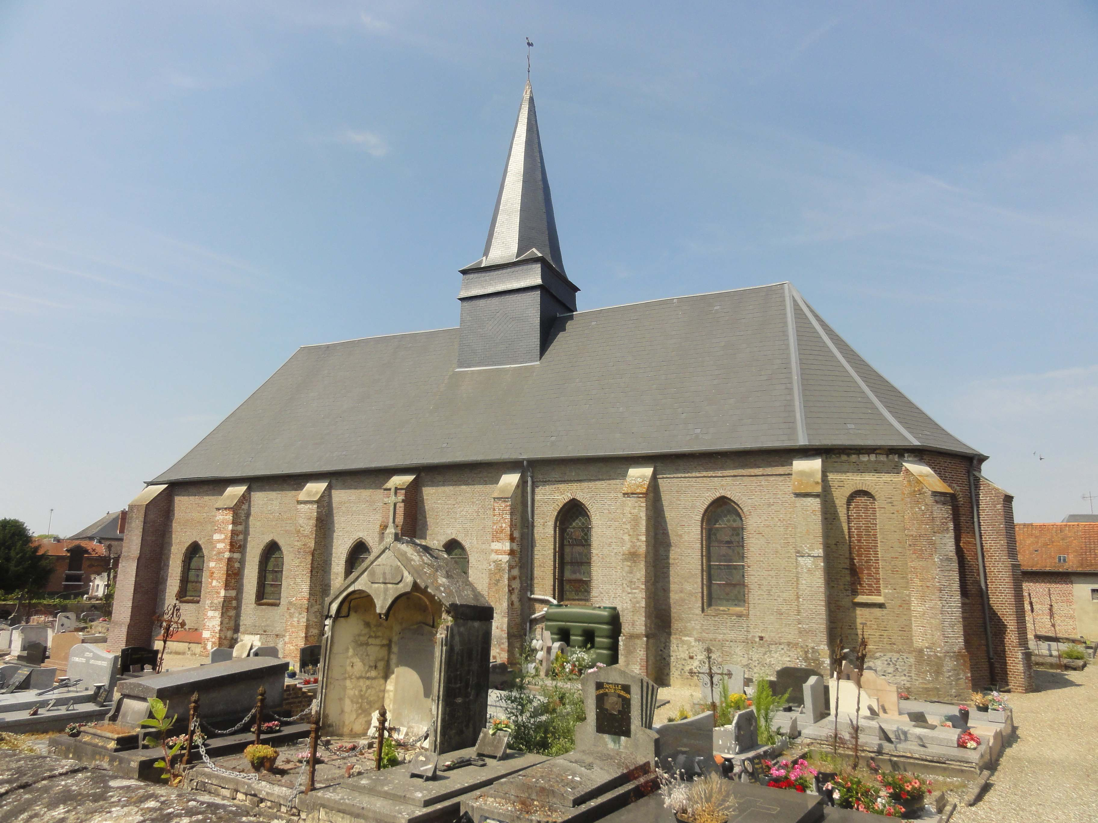 Église de l'Assomption-de-la-Sainte-Vierge de Noyelles-sur-Mer.